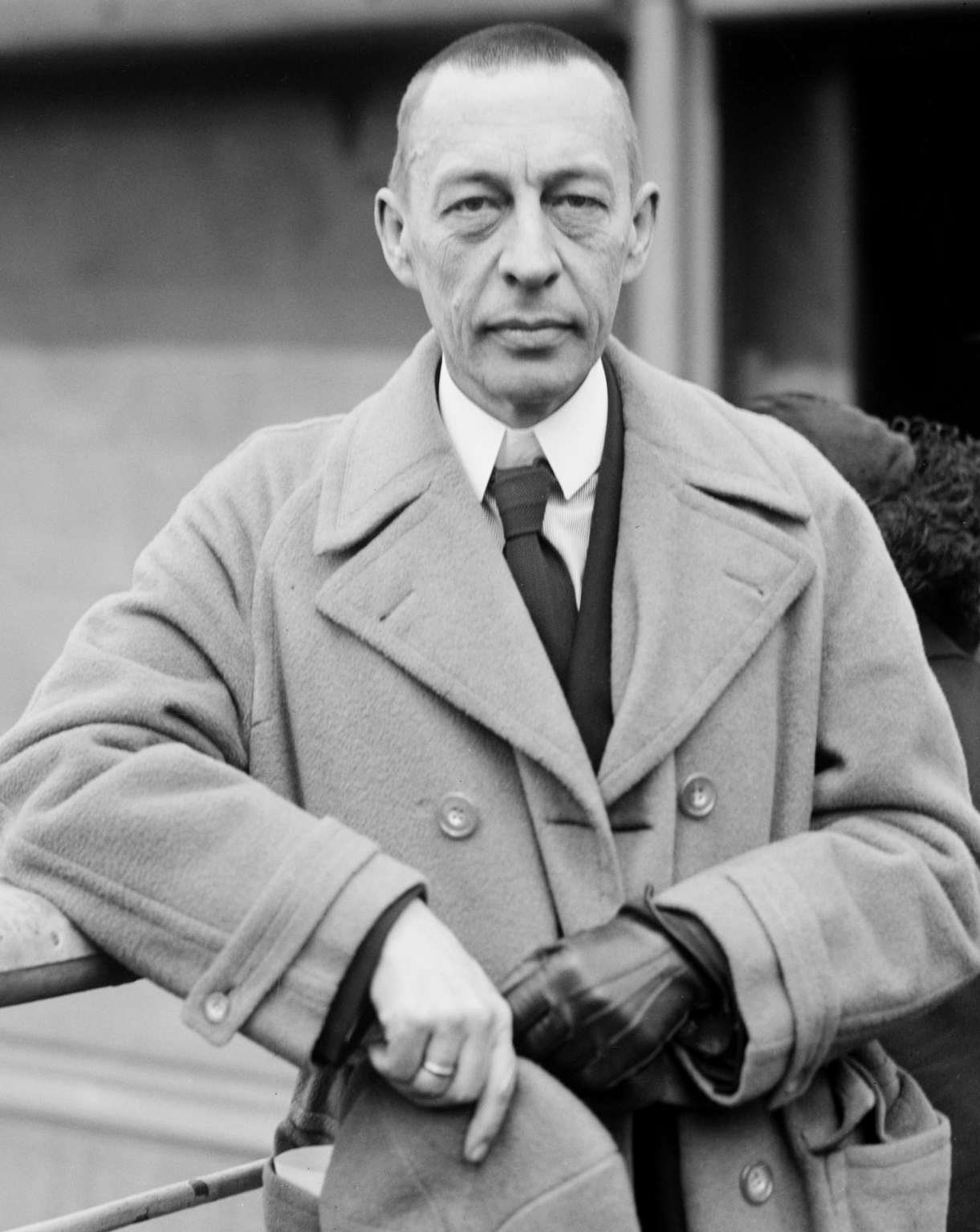 Sergei Rachmaninoff